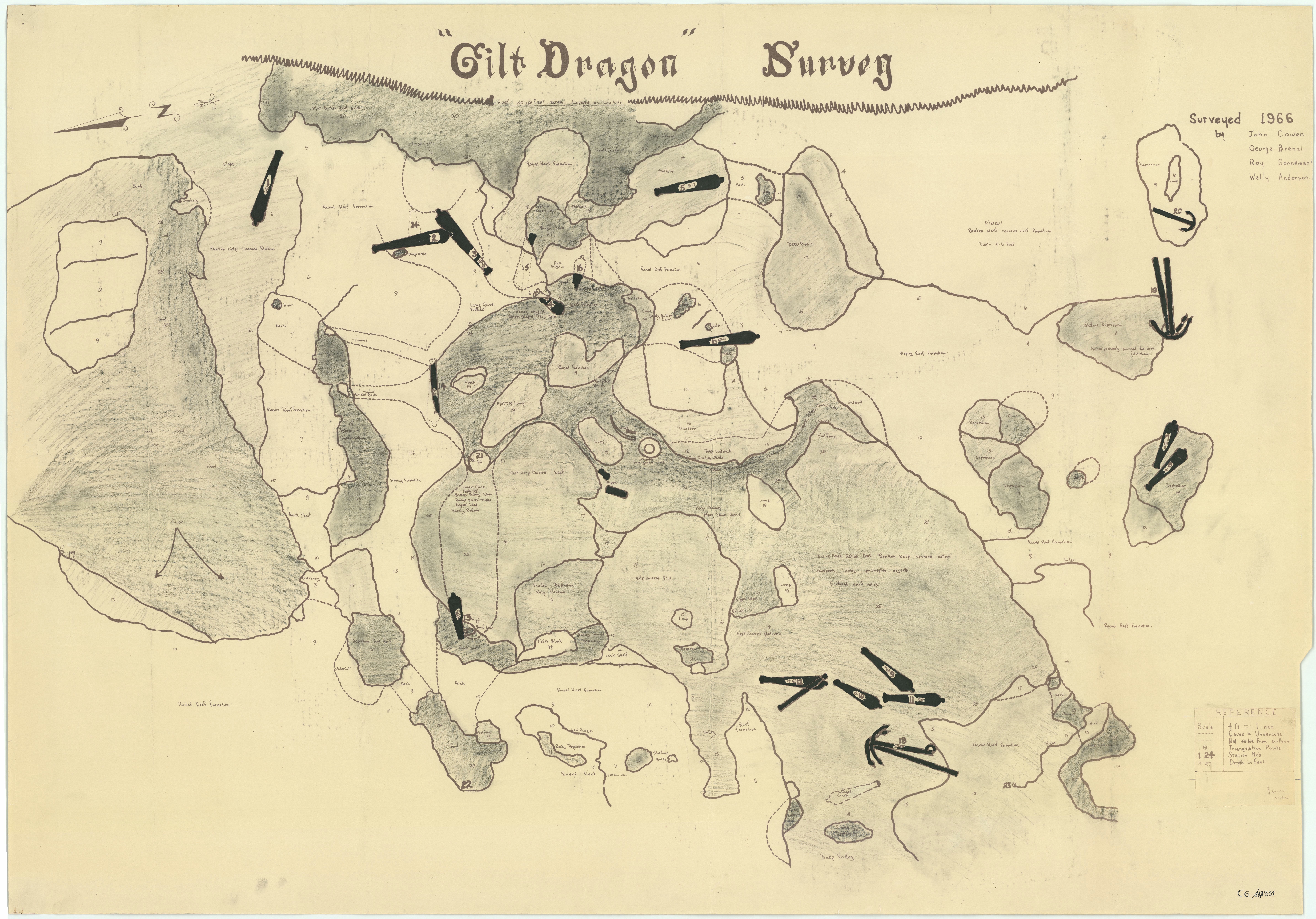 vondsten op de zeebodem van de Vergulde Draeck (opmerking: Techniek: lichtdruk) Objectnummer: [MA]T-117831